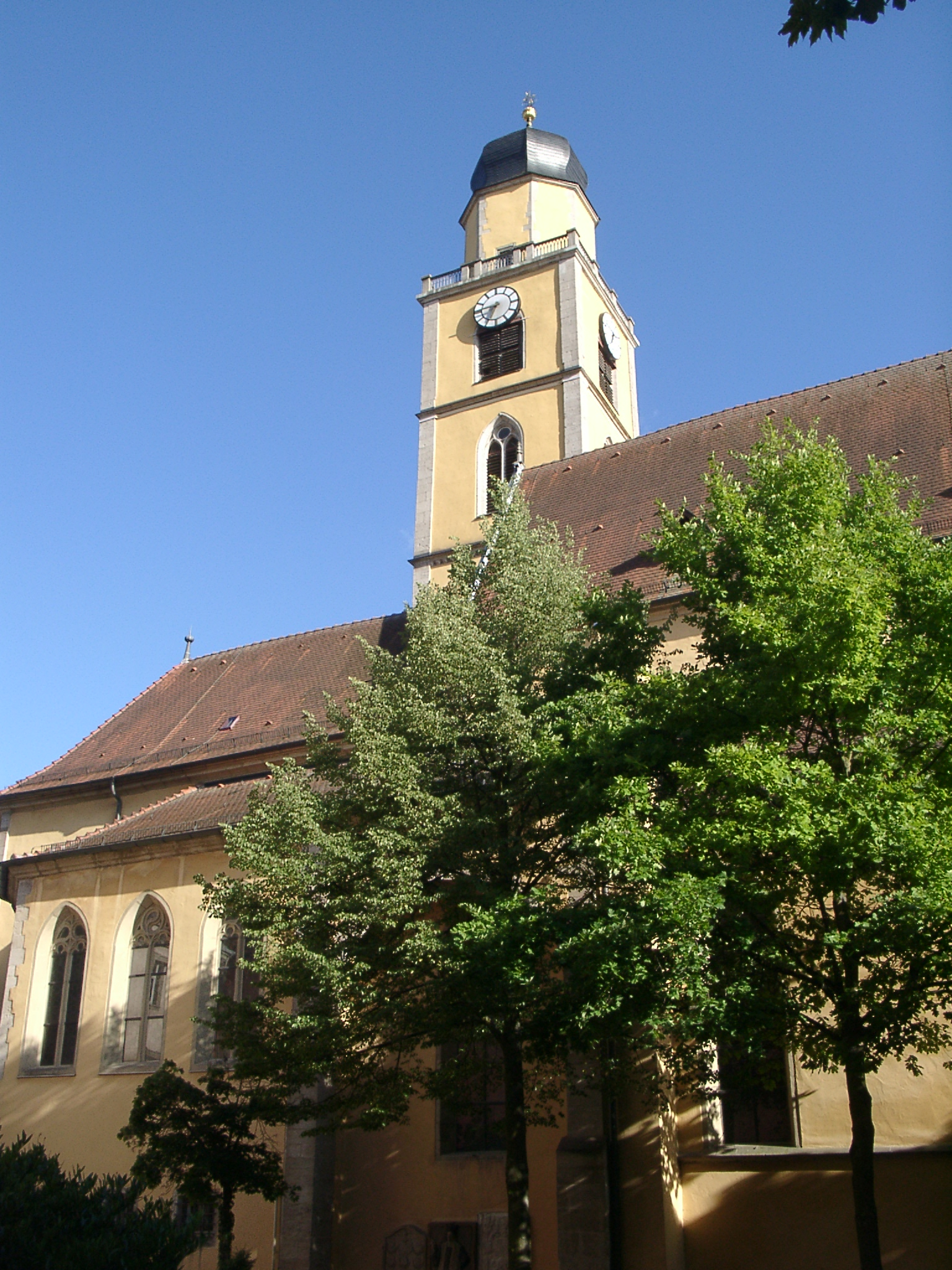 Bad Mergentheim